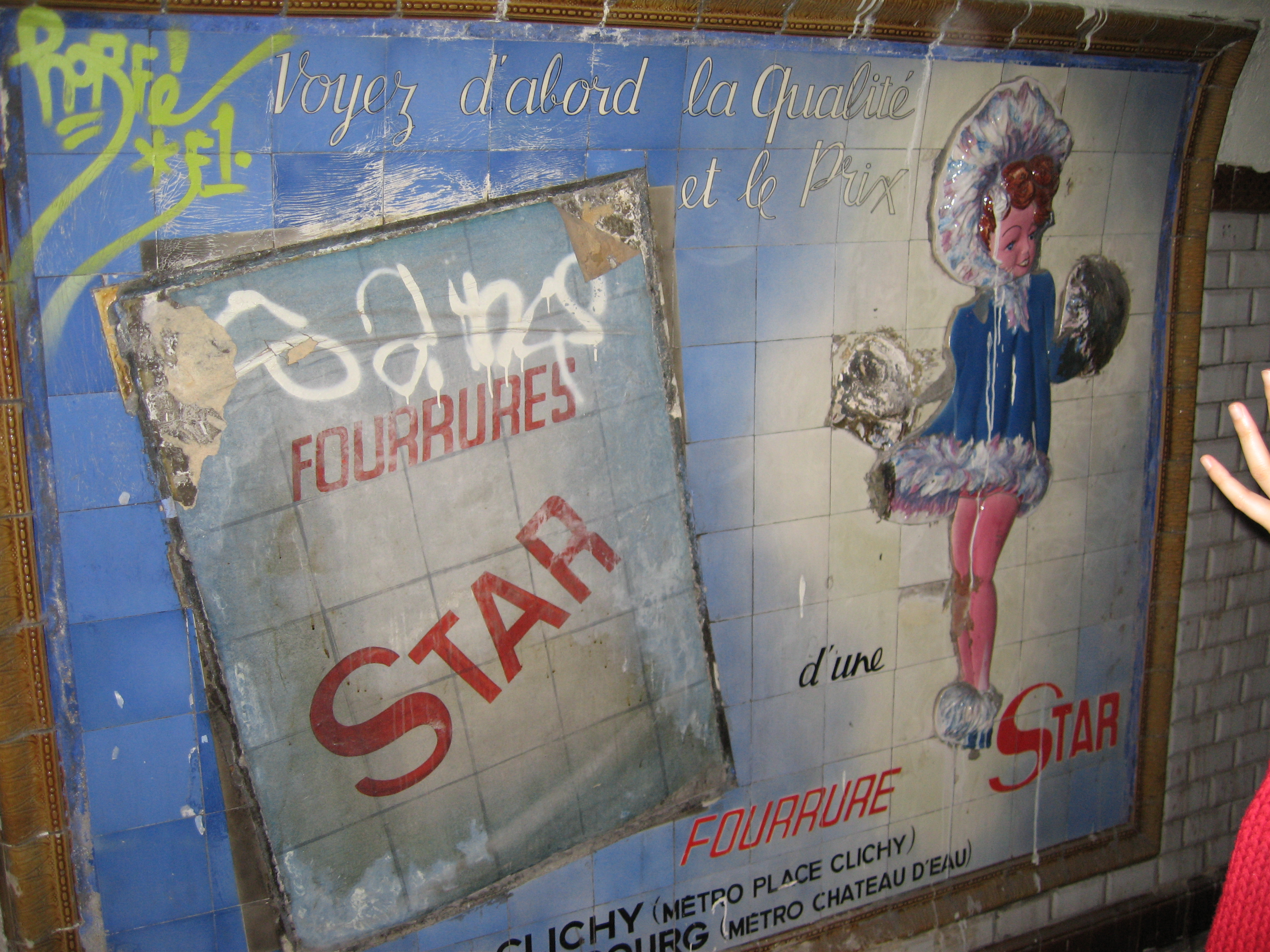 Journées du patrimoine RATP 16-17/09/2006. Publicité Fourrure à Saint-Martin.